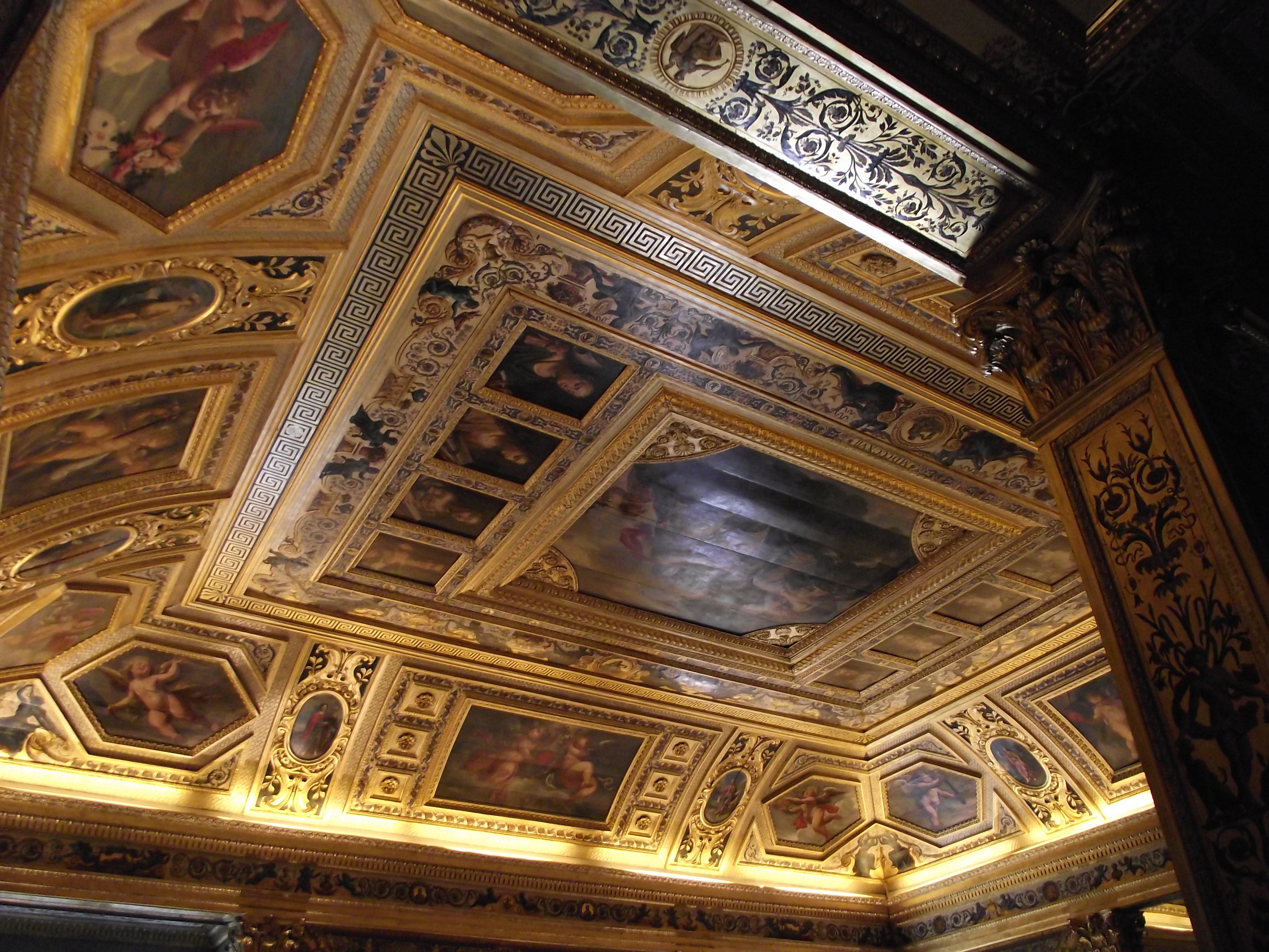 Paris, Palais du Luxembourg, Salle du Livre d'Or